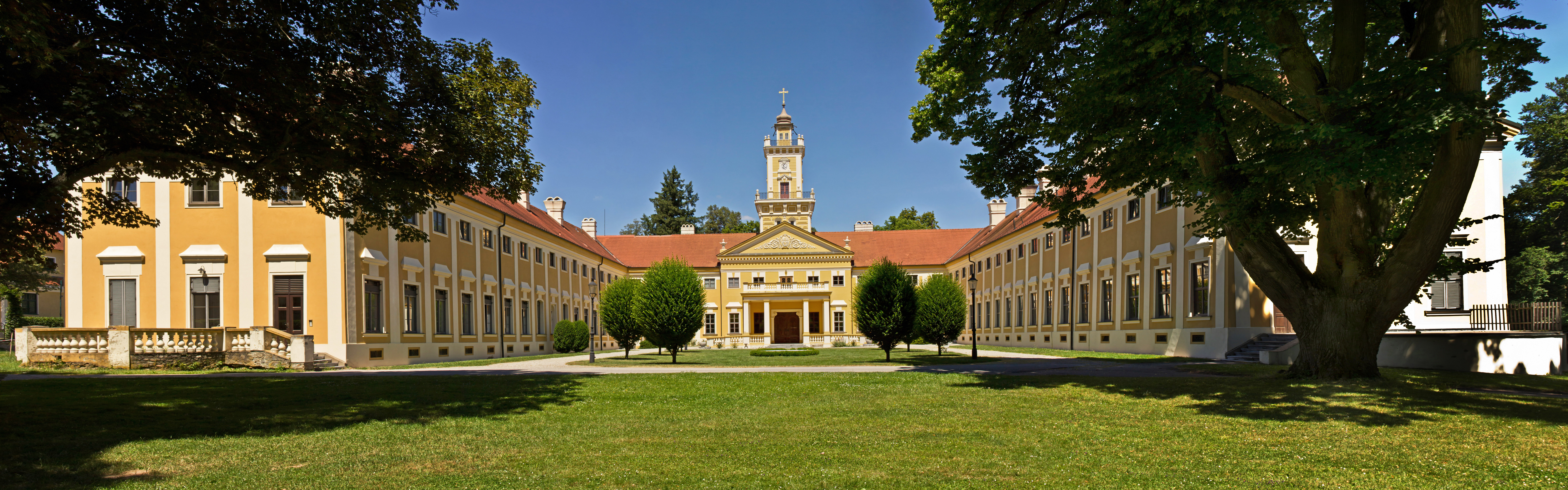 Schloss Jaidhof ist eine klassizistische, außen dreigeschoßige und hofseitig zweigeschoßige Ehrenhofanlage mit einem Baukern aus der zweiten Hälfte des 17. Jahrhunderts.